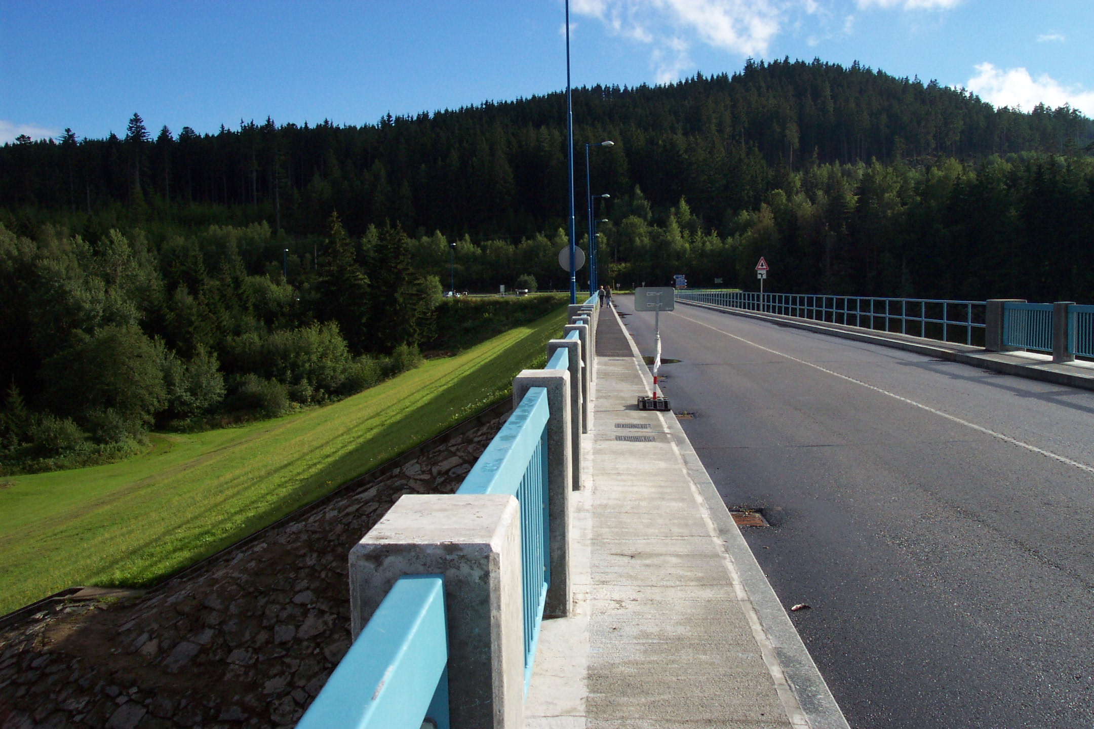 Šumava, Czech republic, The Lipno nad Vltavou dam - Šumava, Přehrada Lipno nad Vltavou